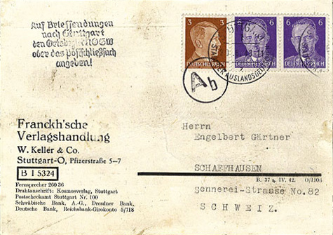 Vom britischen Geheimdienst PWE gefälschte Postkarte, mit gefälschten Briefmarken von Hitler (links) und Himmler (rechts). Alle Stempel sind ebenfalls gefälscht.